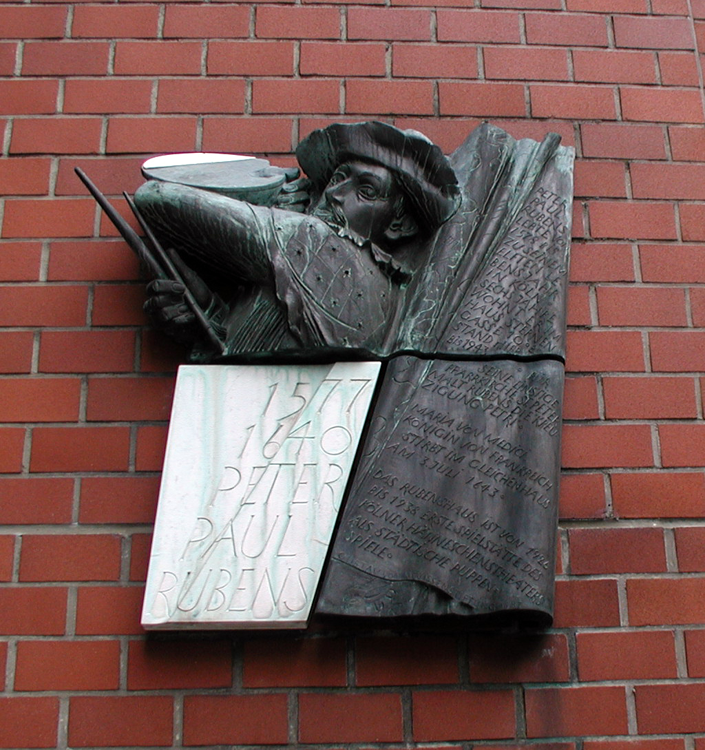 Peter-Paul-Rubens-Gedenkrelief, Köln, Sternengasse 10 Inschrift: 1577 1640 Peter Paul Rubens Peter Paul Rubens lebte von 1578 bis zu seinem elften Lebensjahr in Köln. Sechs Jahre wohnt er im Haus Sternengasse 10. Es stand bis 1943. Für seine einstige Pfarrkirche St. Peter malt Rubens die Kreuzigung Petri. Maria von Medici, Königin von Frankreich, stirbt im gleichen Haus am 3. Juli 1643 . Das Rubenshaus ist von 1925 bis 1938 erste Spielstätte des Kölner Hänneschentheaters als Städtische Puppenspiele.